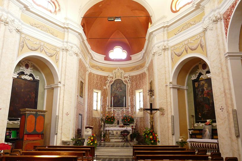 Chiesa di San Nicola da Tolentino, Cervo (IM), Liguria, Italia